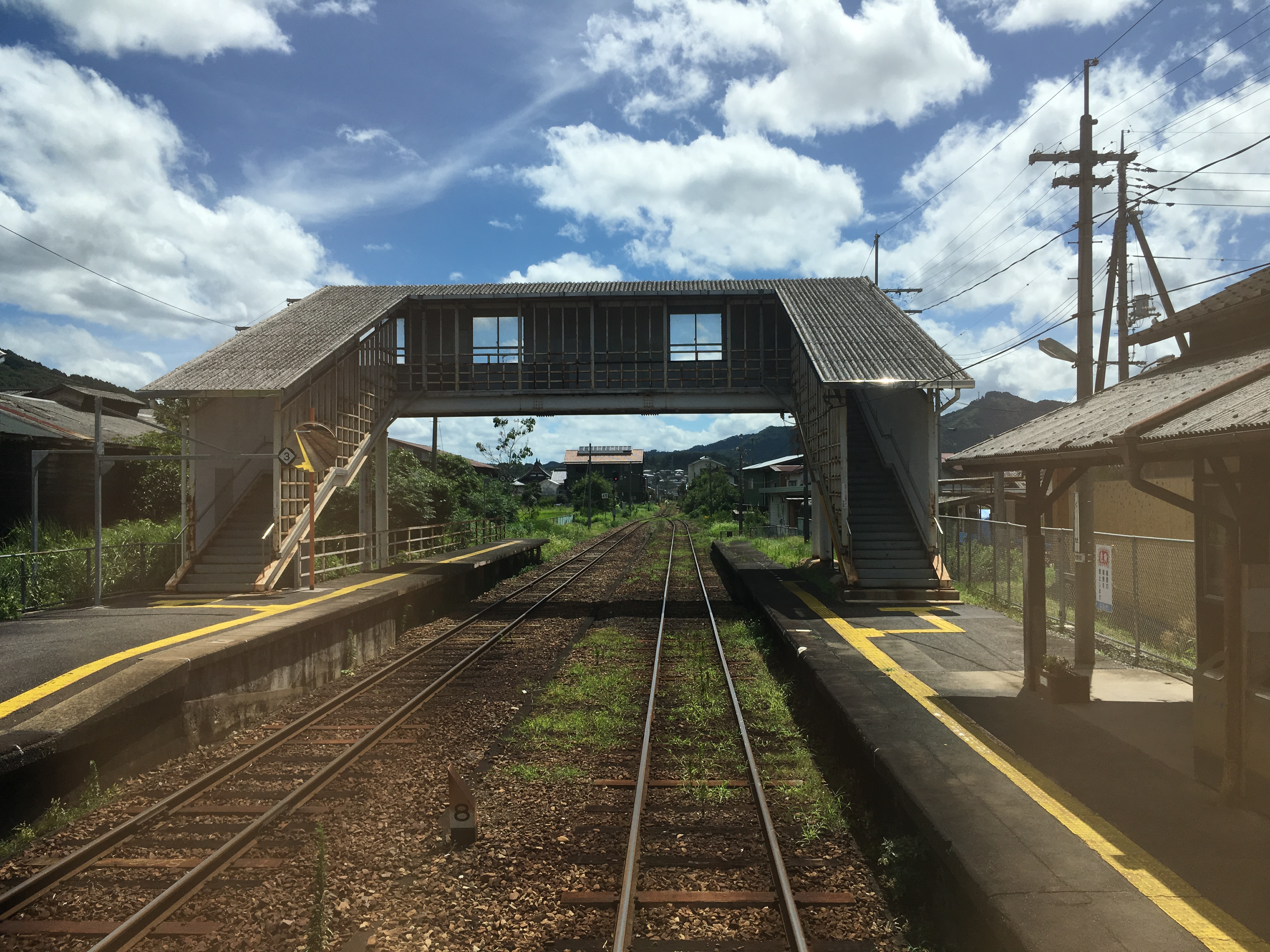 Kuse Station (久世駅)